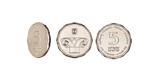 Израильские 10 новыйхшекелей 2012 года выпуска. Гурт, аверс и реверс.